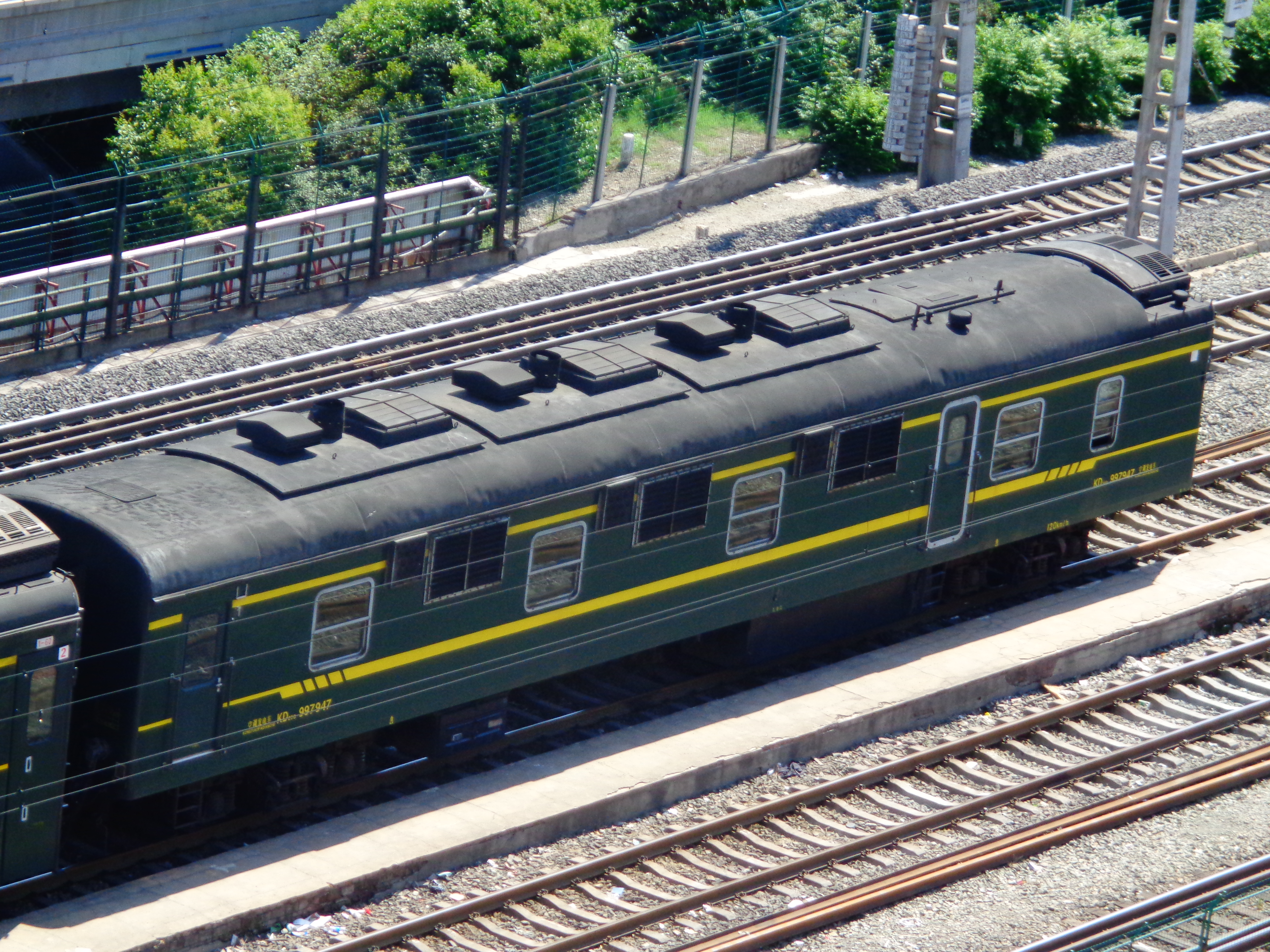 西安市新城区安远门前的陇海铁路